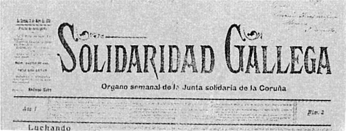 Cabecera de Solidaridad Gallega. Órgano semanal de la Junta solidaria de la Coruña. Año 1. Núm 2